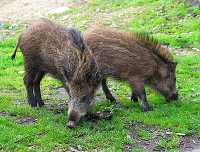 Jabalíes asturianos.